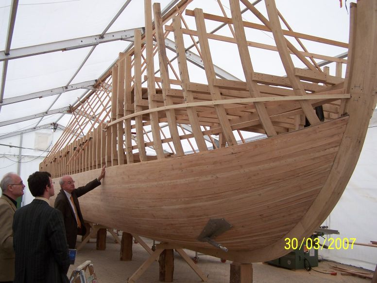 Arbeiten am Nachbau des Neumagener Weinschiffs in der HWK Trier.